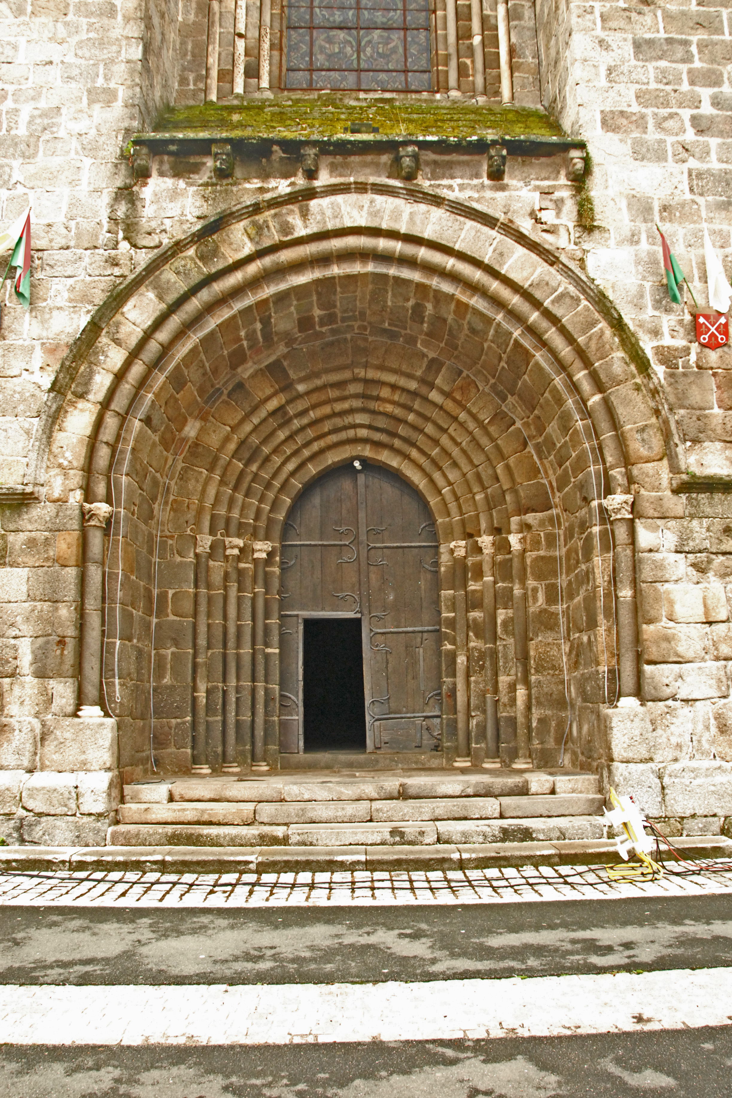 St-Pierre de Le Dorat, Nordportal